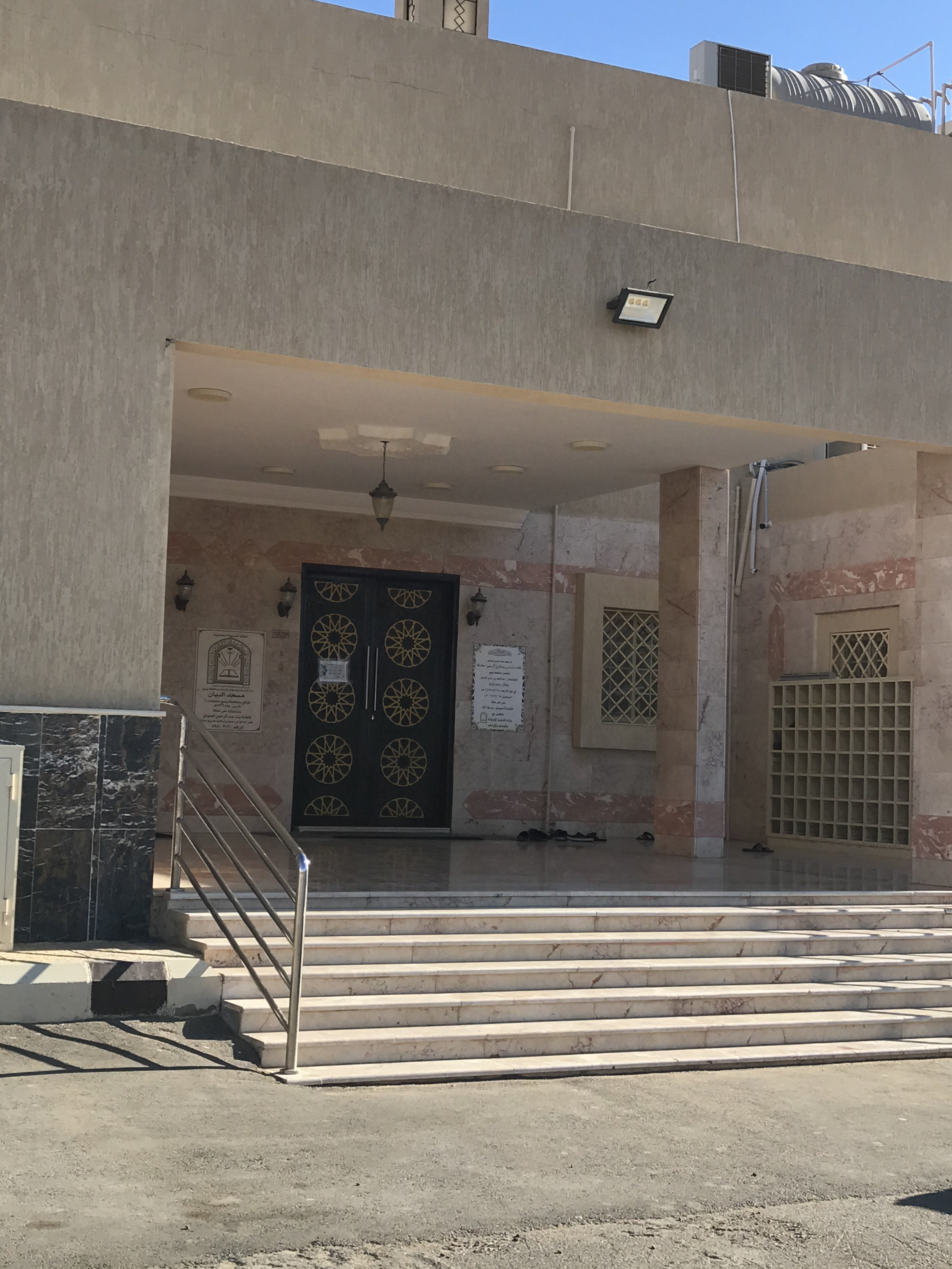 جامع البيان بمحافظة ينبع